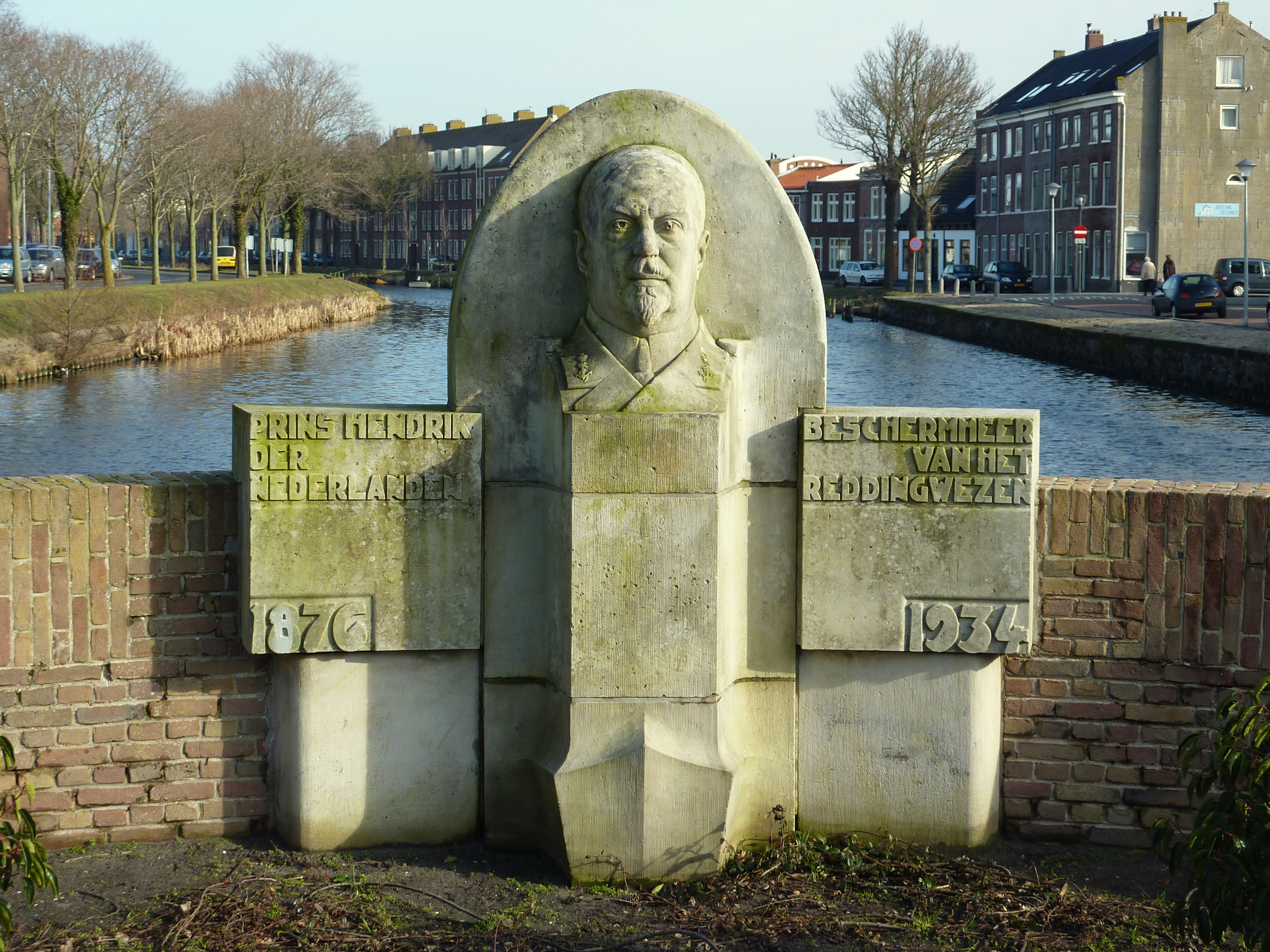 Monument voor Prins Hendrik. Het reliëf is onderdeel van het Monument voor het Reddingswezen, maar kan ook als zelfstandig monument gezien worden.